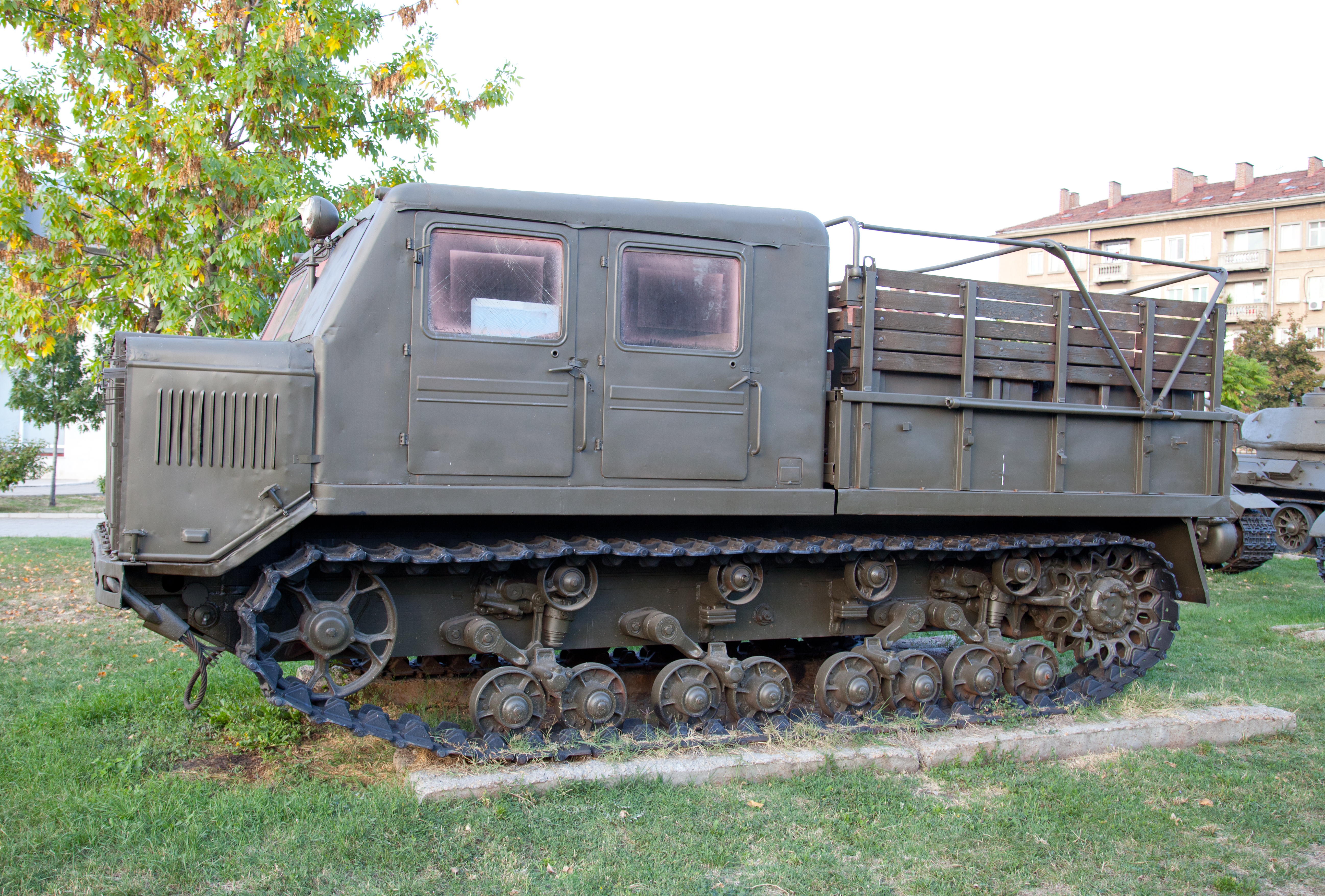 Sofia; der "Frauenmarkt" (Schenski pasar)